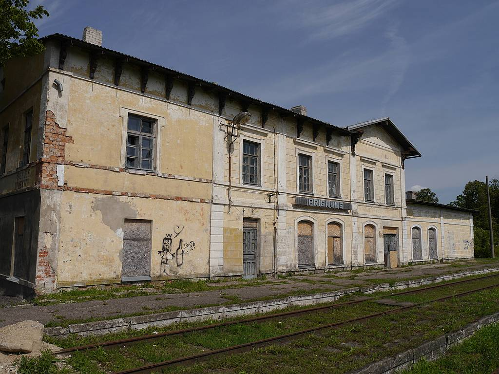 Состояние городского вокзала на лето 2015 года